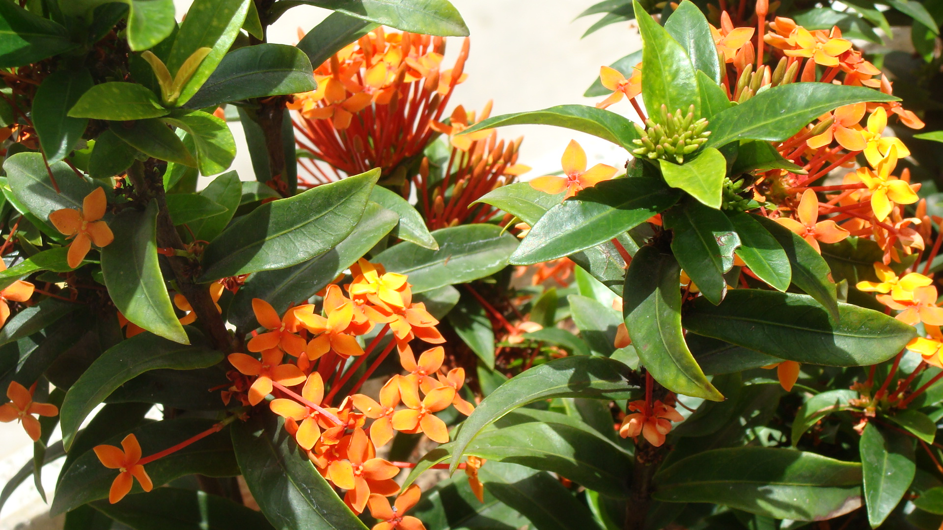 Flores de Ixora coccinea en un jardín de Caracas, Venezuela